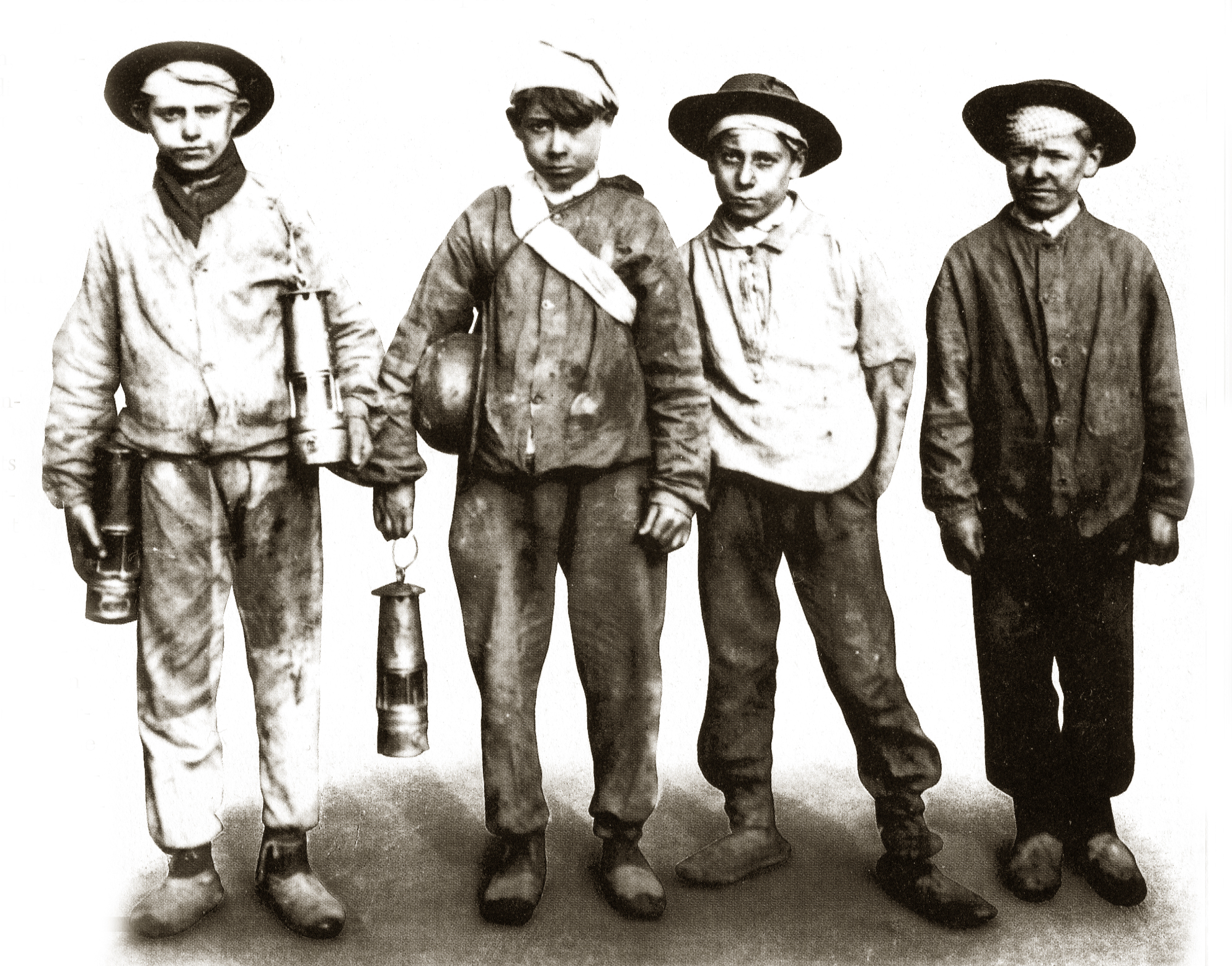 Дети - шахтёры.